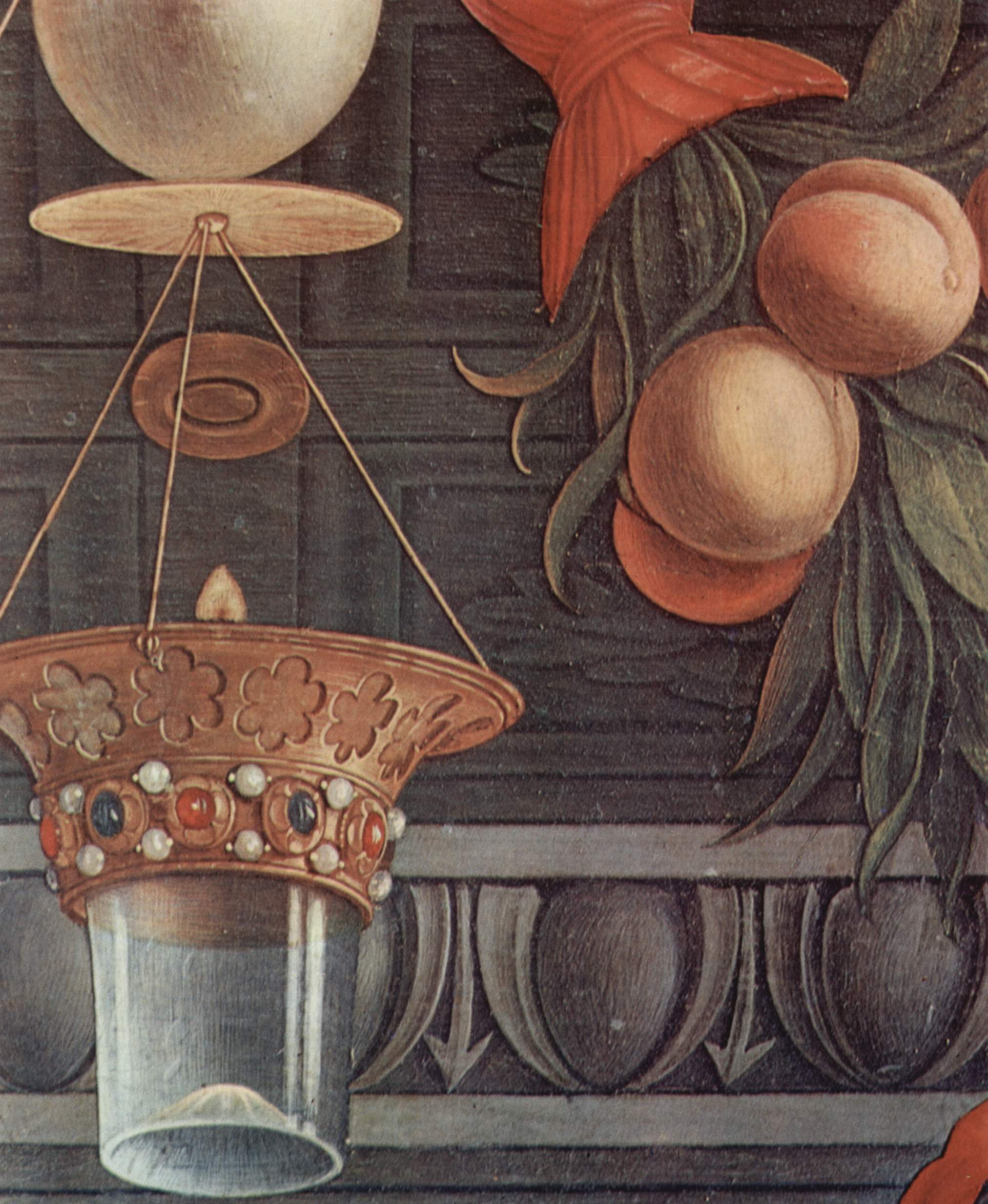 detail